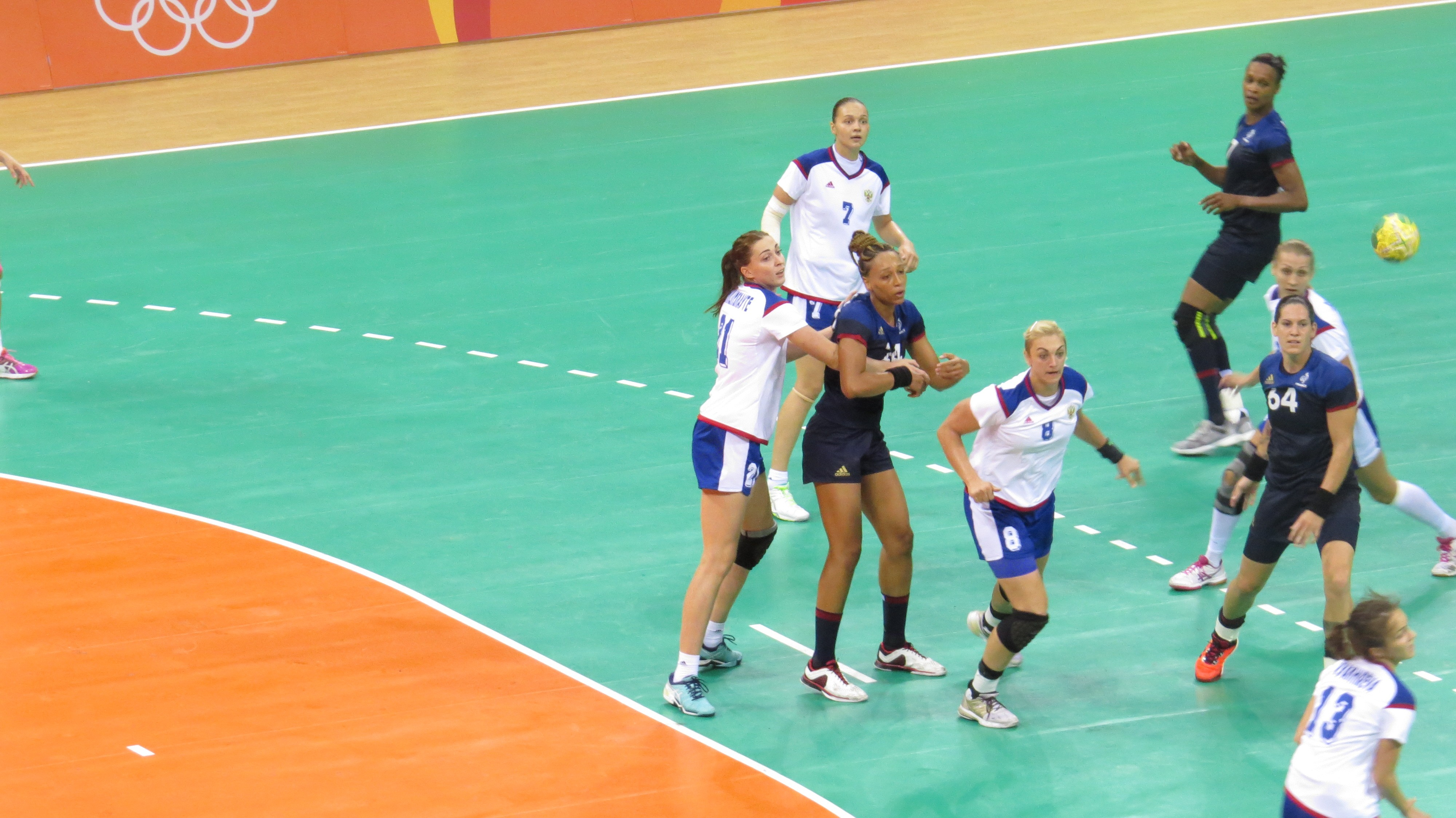 Rio 2016. sx 212